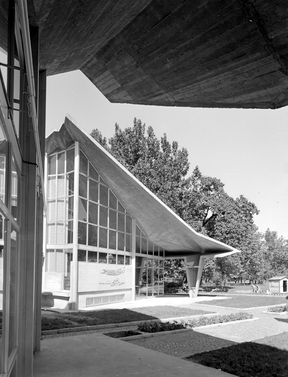 Servizio fotografico : Milano, 1963 / Paolo Monti. - Buste: 5, Fototipi: 5 : Negativo b/n, gelatina bromuro d'argento/ pellicola ; 10x12. - ((Serie costituita da 5 buste di negativi identificati con i nn.: 1581, 1582, 1583, 1584, 1585, e tenute insieme da una graffetta. - Sul coperchio della scatola iscrizione didascalica manoscritta a pennarello nero: "Garzanti". - La X Triennale (Prefabbricazione - Industrial Design: Esposizione Internazionale delle Arti Decorative e Industriali Moderne e dell'Architettura Moderna) si tenne dal 28 agosto al 15 novembre del 1954. In quell'occasione fu realizzato il Padiglione Soggiorno con l'intervento, tra gli altri, di Umberto Milani. - Occasione: Documentazione dell'opera di Umberto Milani per la X Triennale di Milano, 1954. - Fonte: Quaderno ad anelli di Paolo Monti: s.t. [Soggetti e committenti] (1956-1961), presso Archivio Paolo Monti